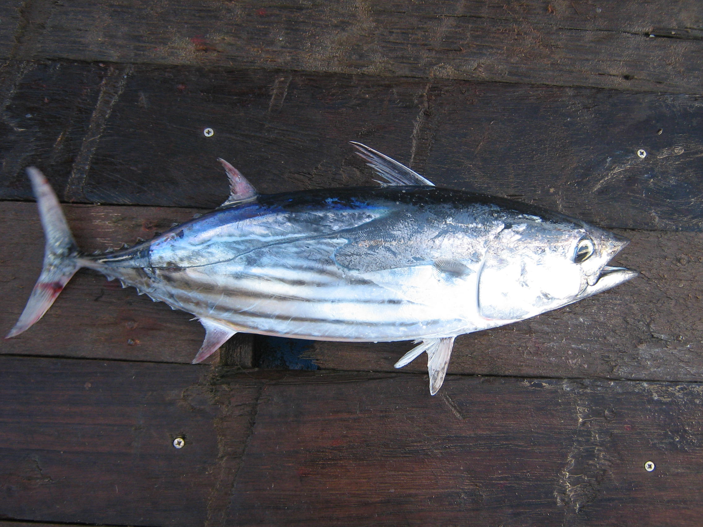 listao capturé à la senne dans l'océan indien bycatch